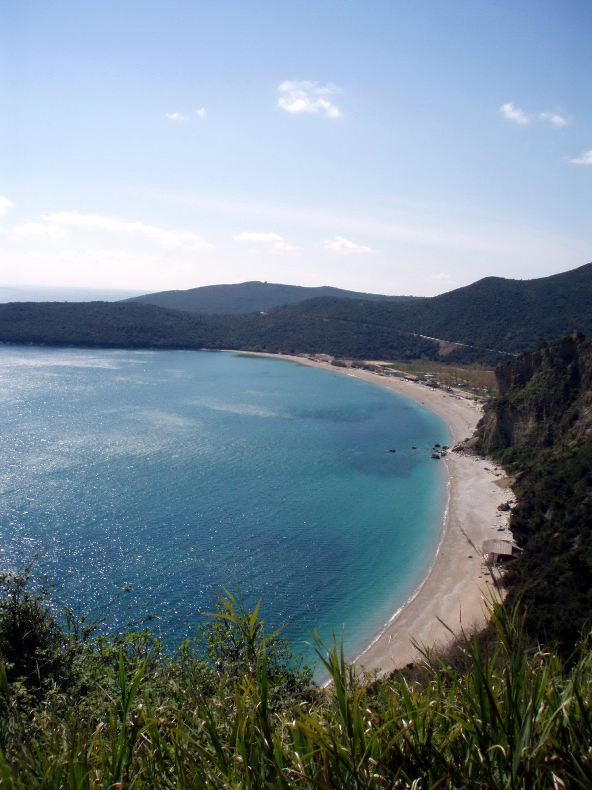 Budva, Beach Jaz